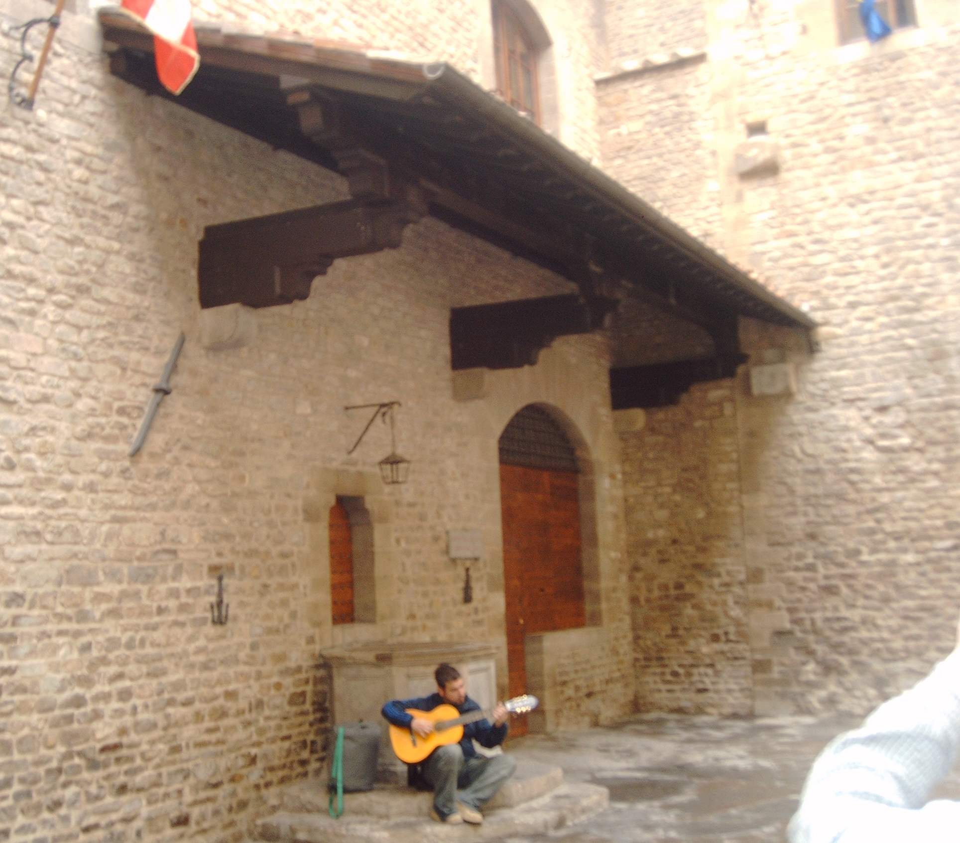 Dante Alighieris Geburtshaus in Florenz Aufnahme: September 2005 Url